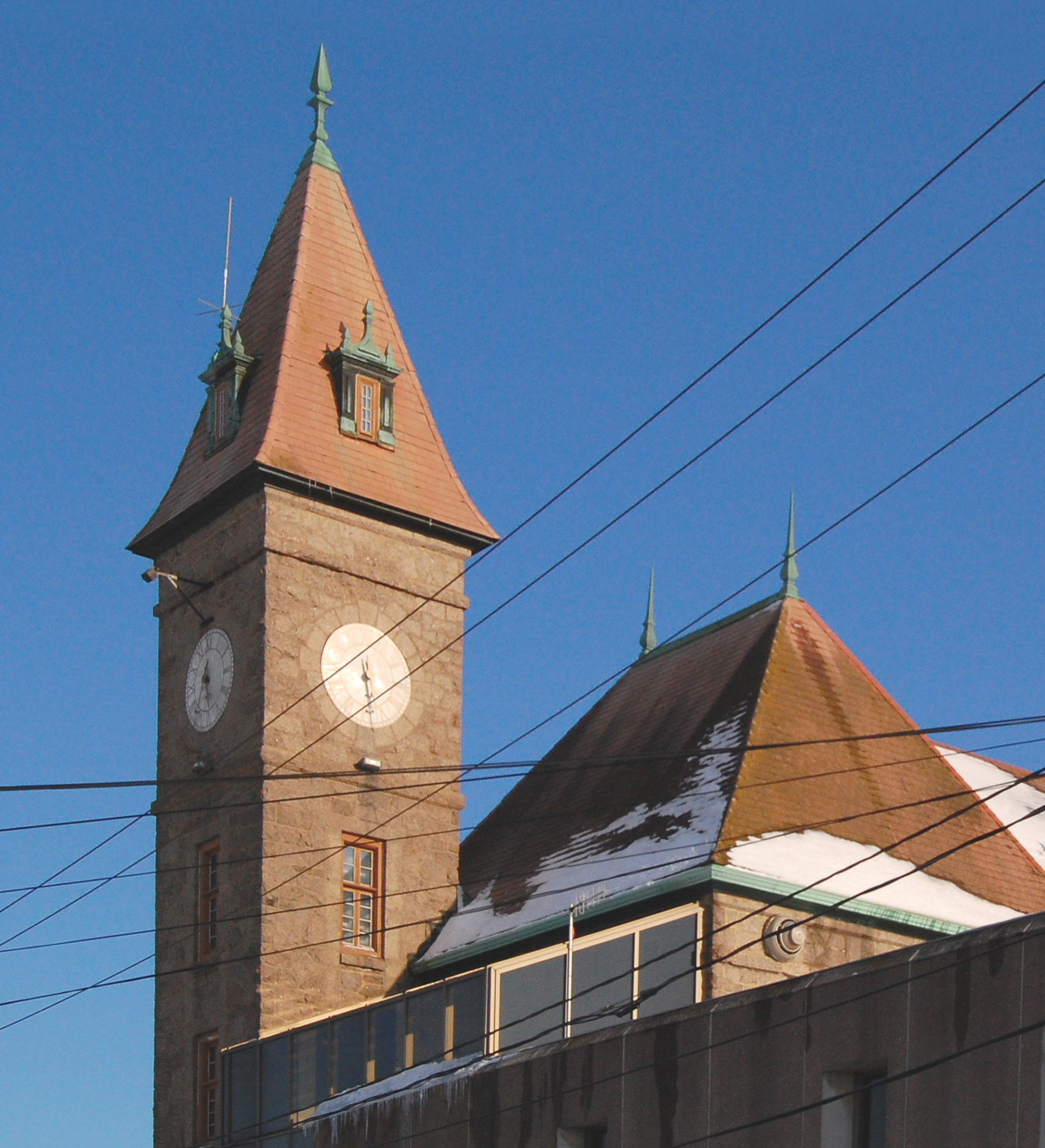 Ancienne Hôtel de Ville de Port-Alfred, Province de Québec, Canada